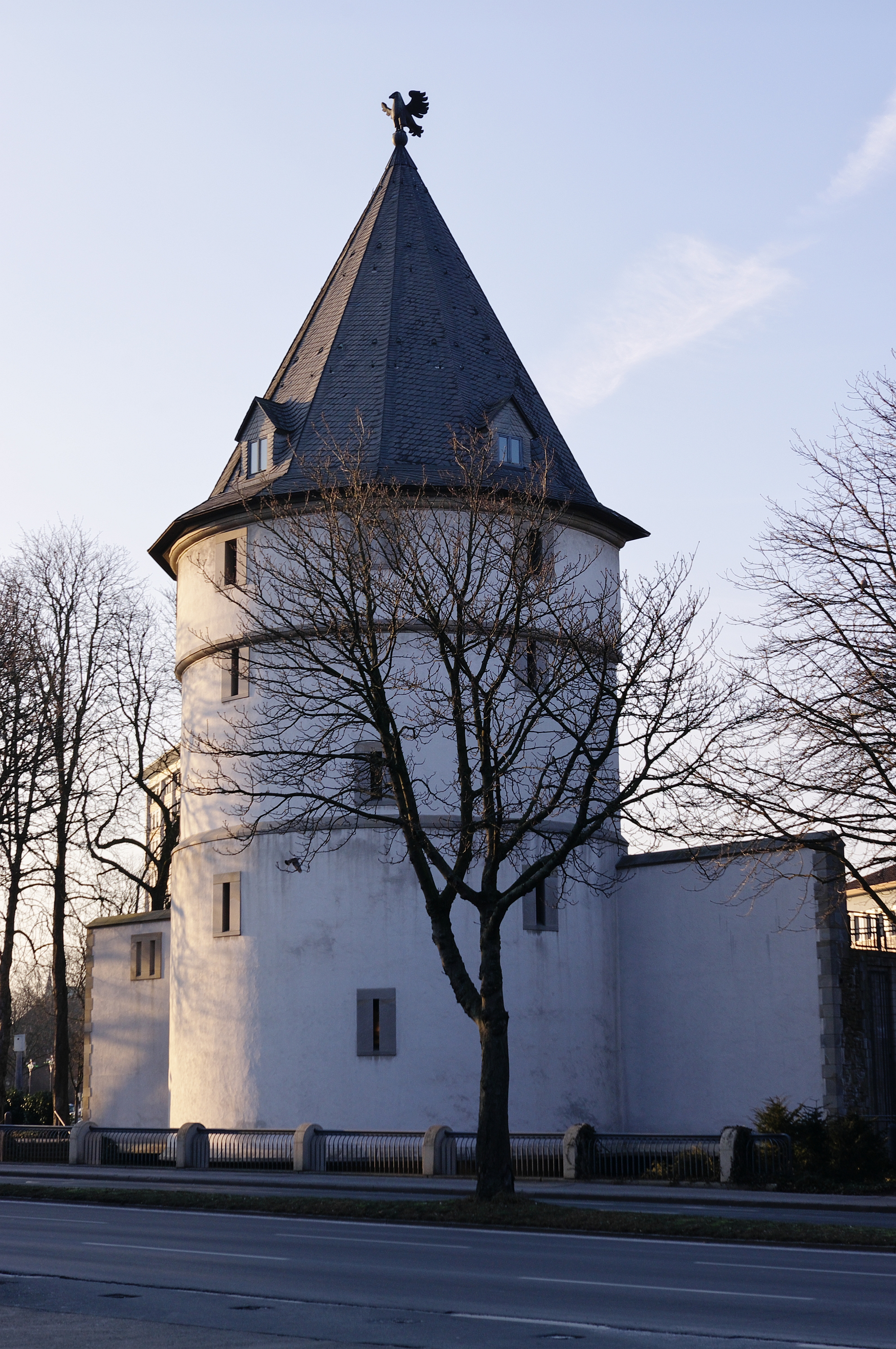 Der historische Adlerturm war Teil der ehemaligen Dortmunder Stadtbefestigung. Der heutige Bau ist eine Rekonstruktion aus dem Jahr 1992, die über den denkmalgeschützten mittelalterlichen Fundamenten errichtet wurde.